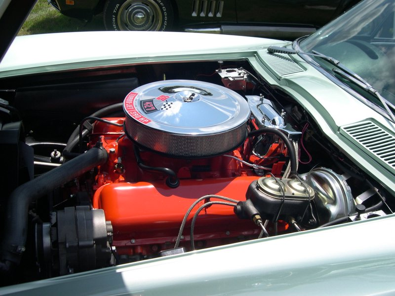 1966 Chevrolet Corvette 1966 L36 4-barrel 427 big-block